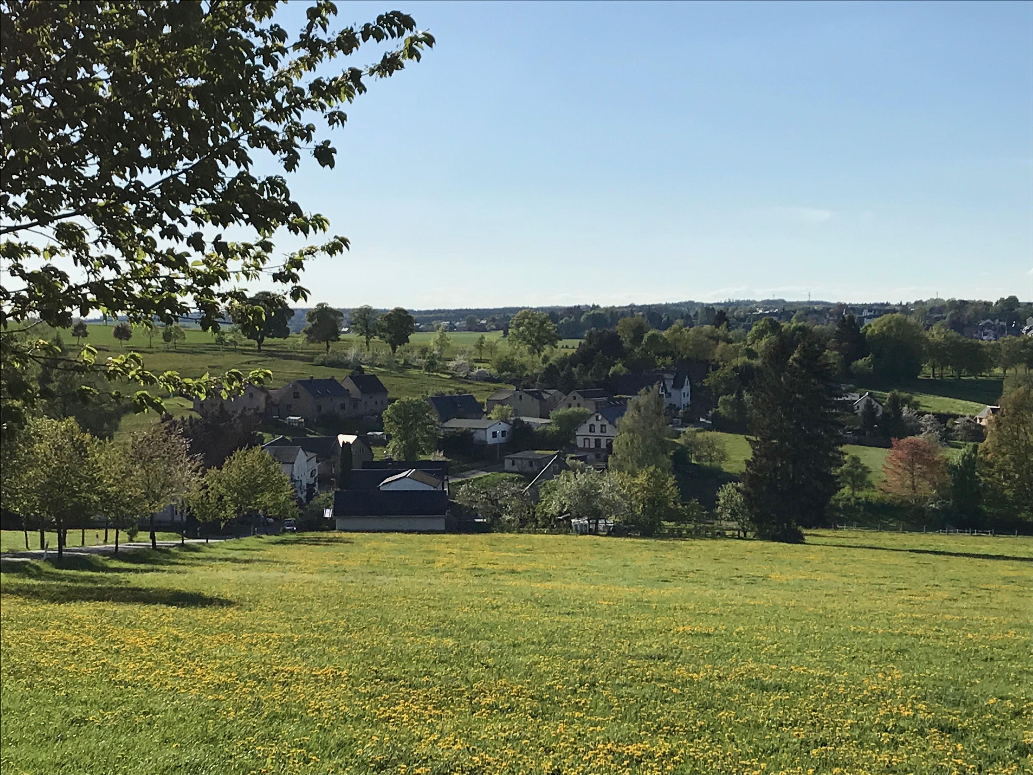 Ansicht Ortsteil Veitenhäuser (2018)